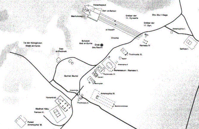 Ausschnitt der Karte der Gräber von Theben-West- Mit einem Punkt ist das Grab des Nacht markiert